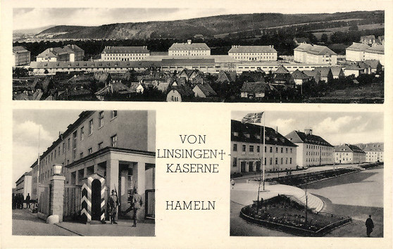 Linsingen Kaserne, benannt nach Generaloberst Alexander v. Linsingen